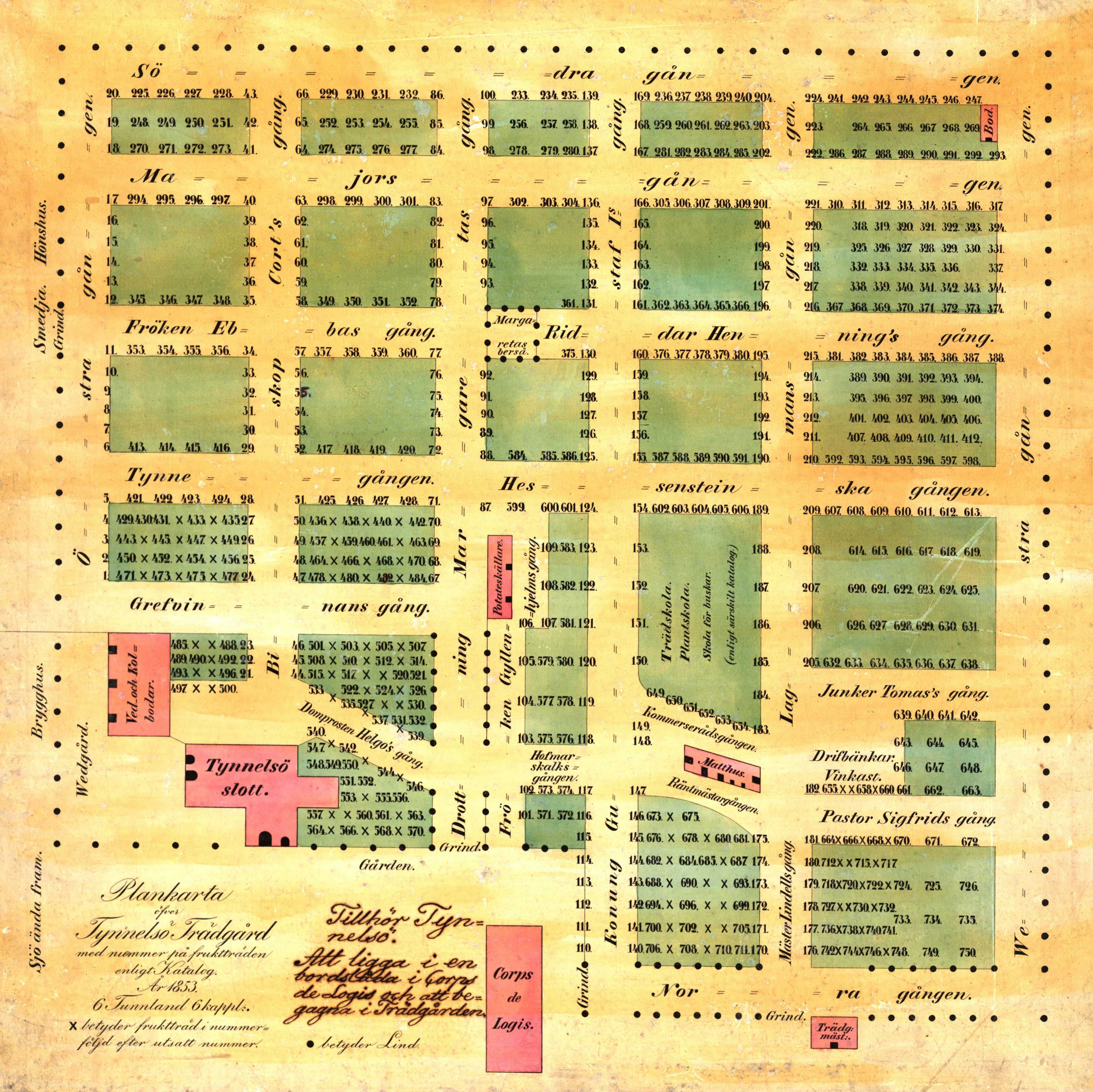 Tynnelsö fideikommiss. Tryckta plankartor över trädgården 1853-1867, A: 7.